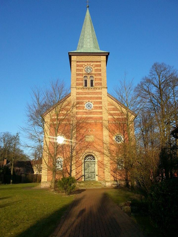 Haupteingang der Marienkirche, 16.03.2016